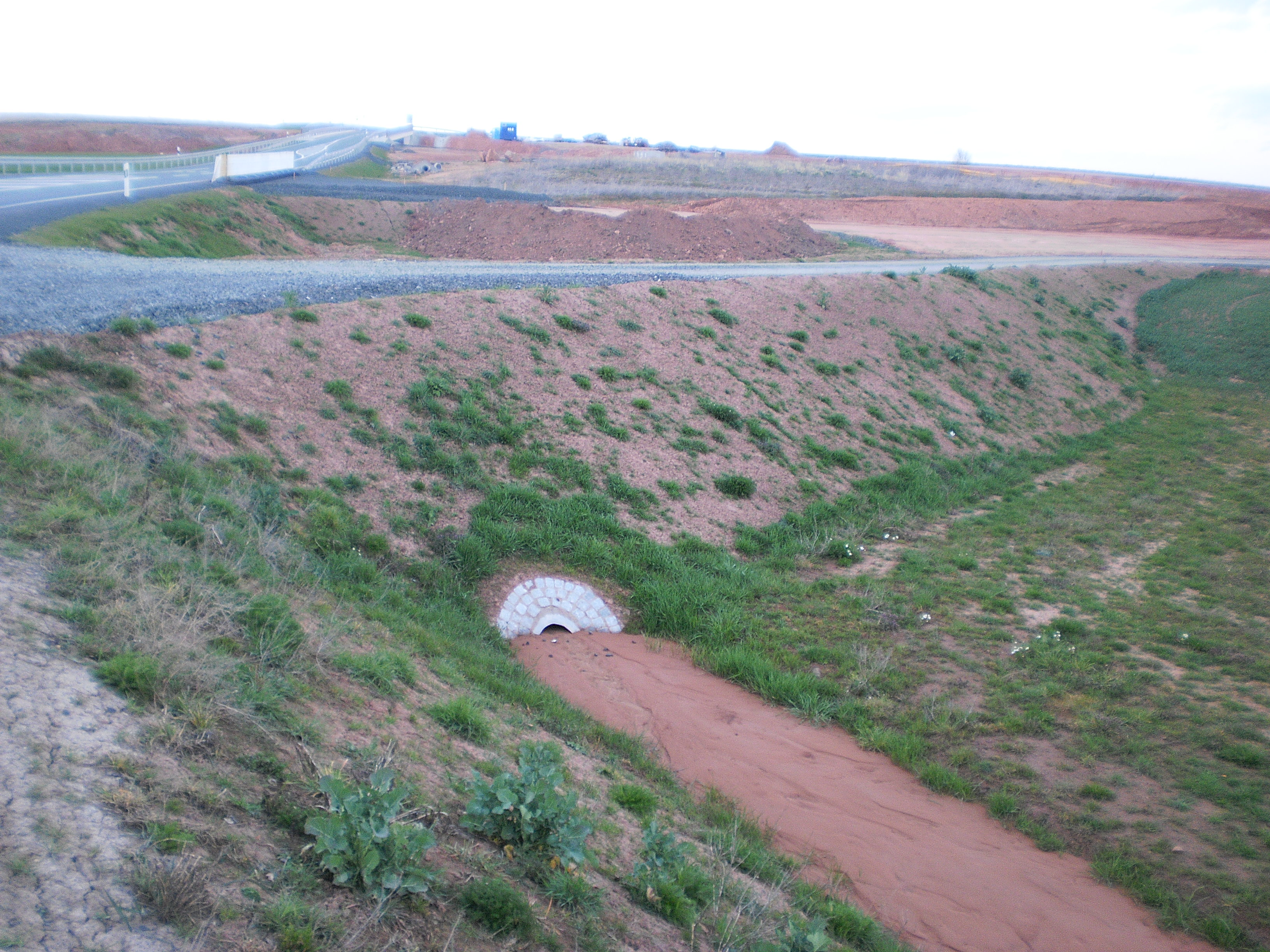 B 252-Bundesstrasse: Neubau und Strassengraben an der Kreisstrasse 84 im Landkreis Marburg-Biedenkopf, 2017-03-27.